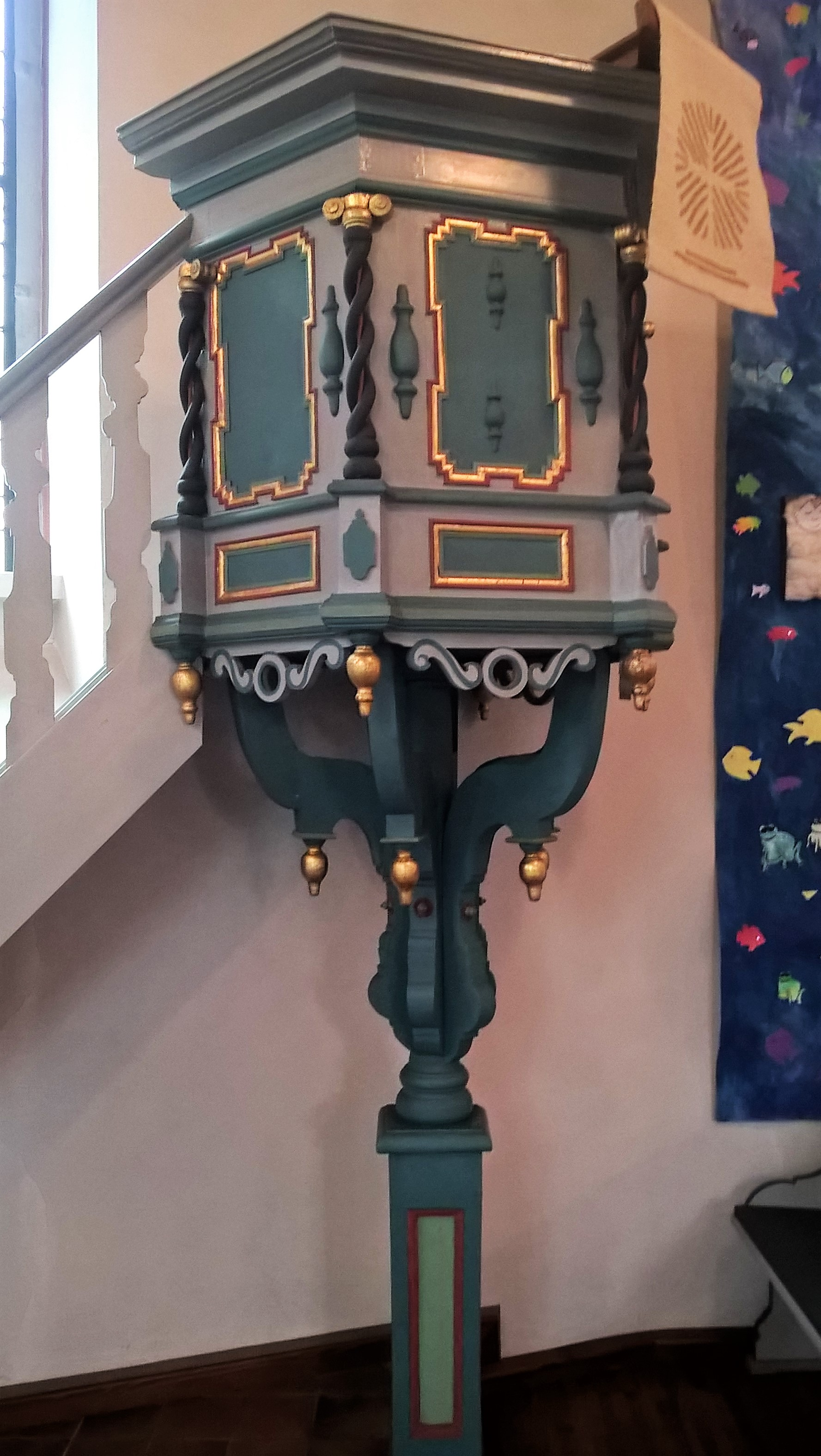 Evangelische Kirche Butzbach-Maibach, Wetteraukreis, Hessen, Deutschland